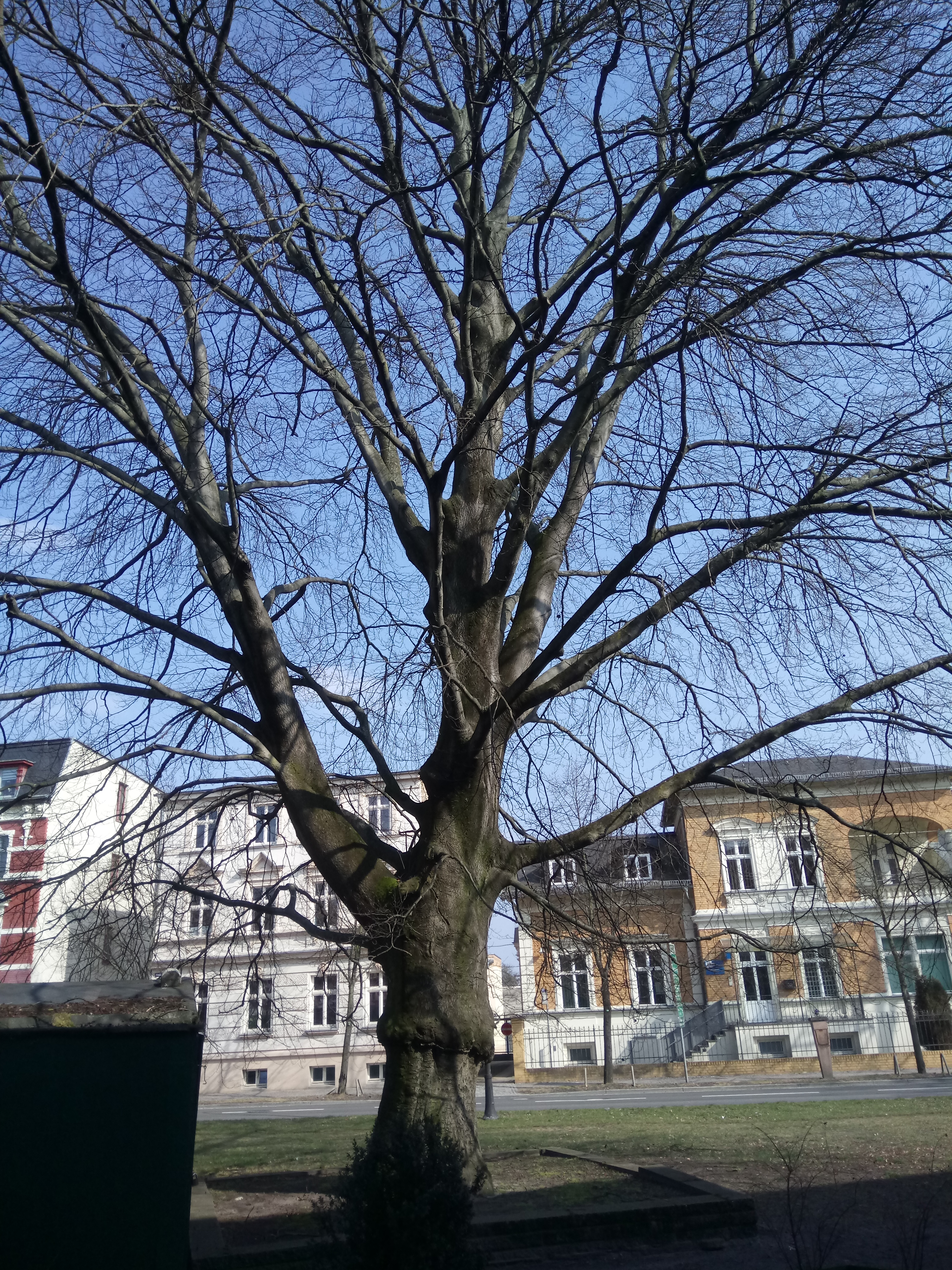 Blutbuche (Fagus sylvatica "Atropurpurea"). Kronendurchmesser 20 Meter im Stadtgebiet von Werder (Havel). Grünanlage Unter den Linden/Potsdamer Straße